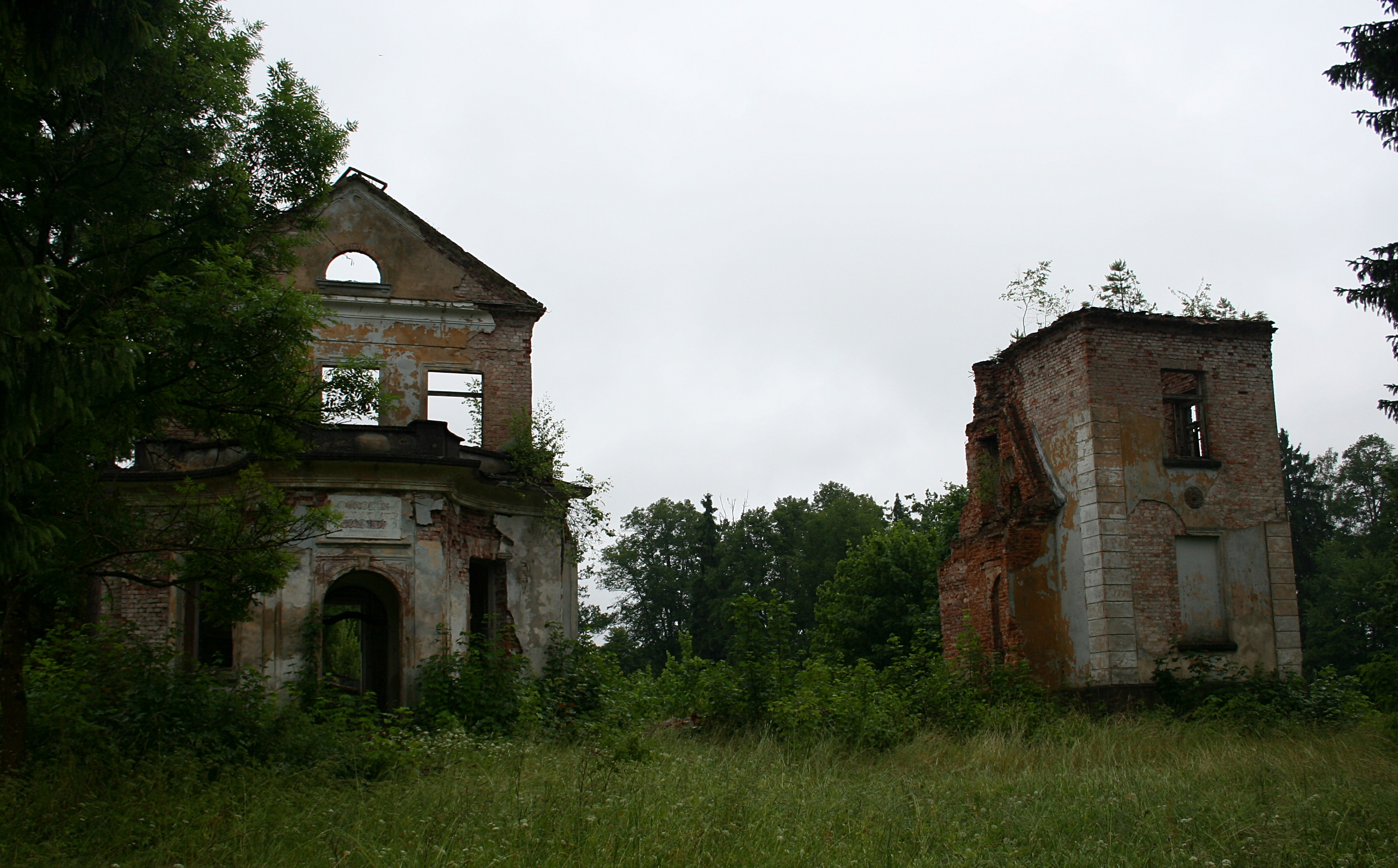 Ruiny dworku w Jasieniu, powiat bytowski